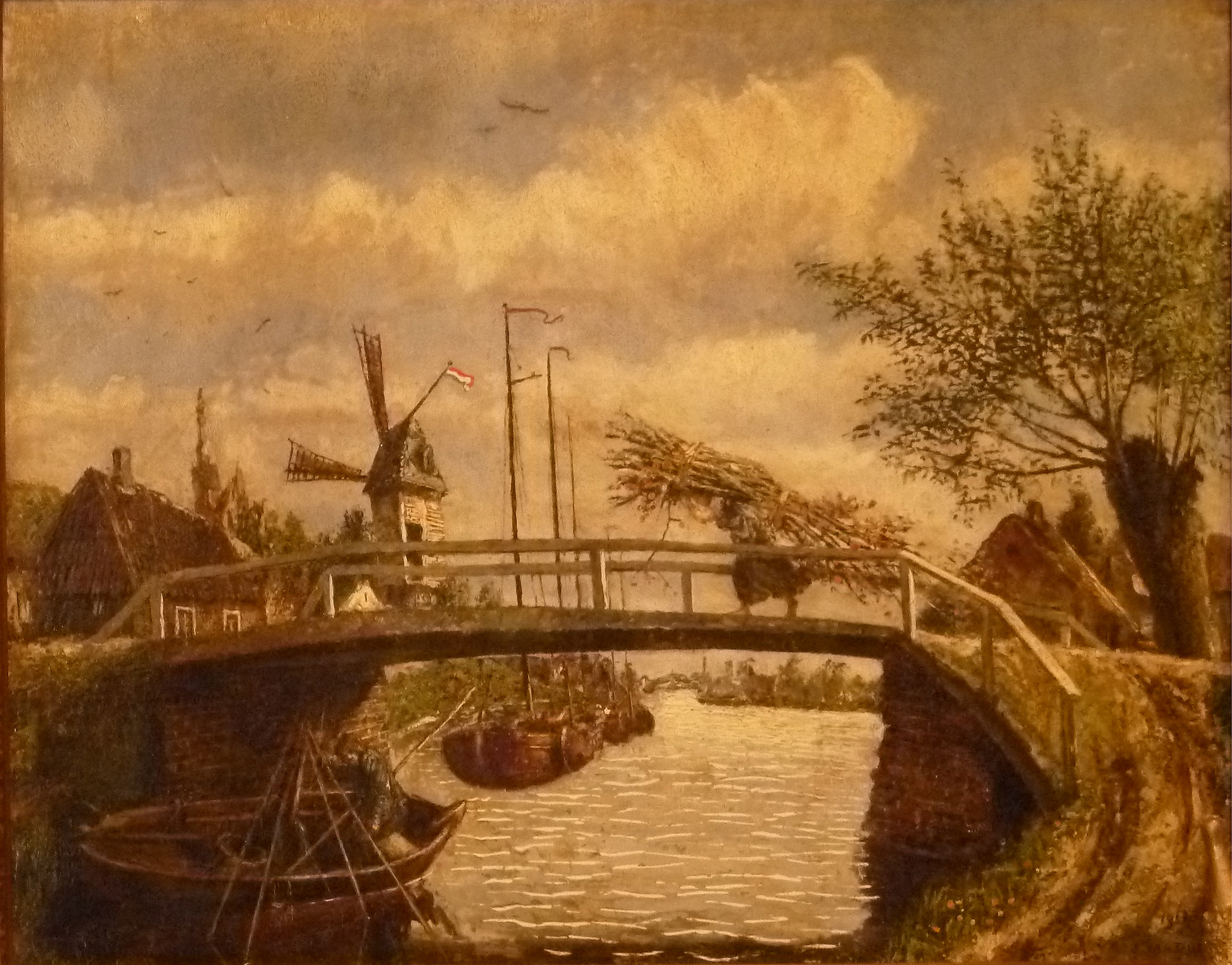 "Hollands rivierlandschap met brug en molen", olieverf op doek (49 x 67 cm) door de Nederlands-Belgische kunstschilder Adrien Jean Madiol; privébezit